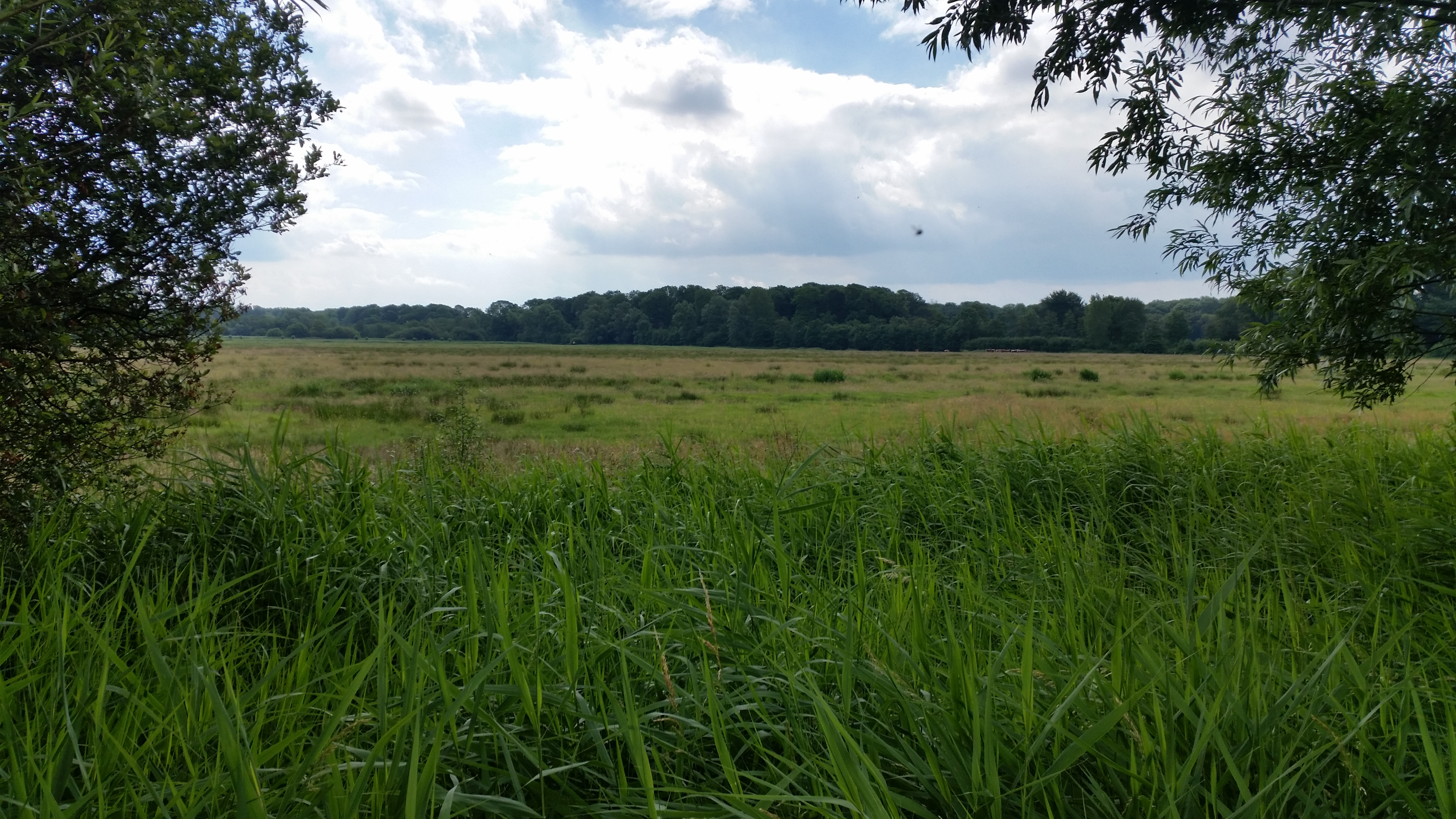 Polder Meerzicht in het noorden van Amsterdamse Bos